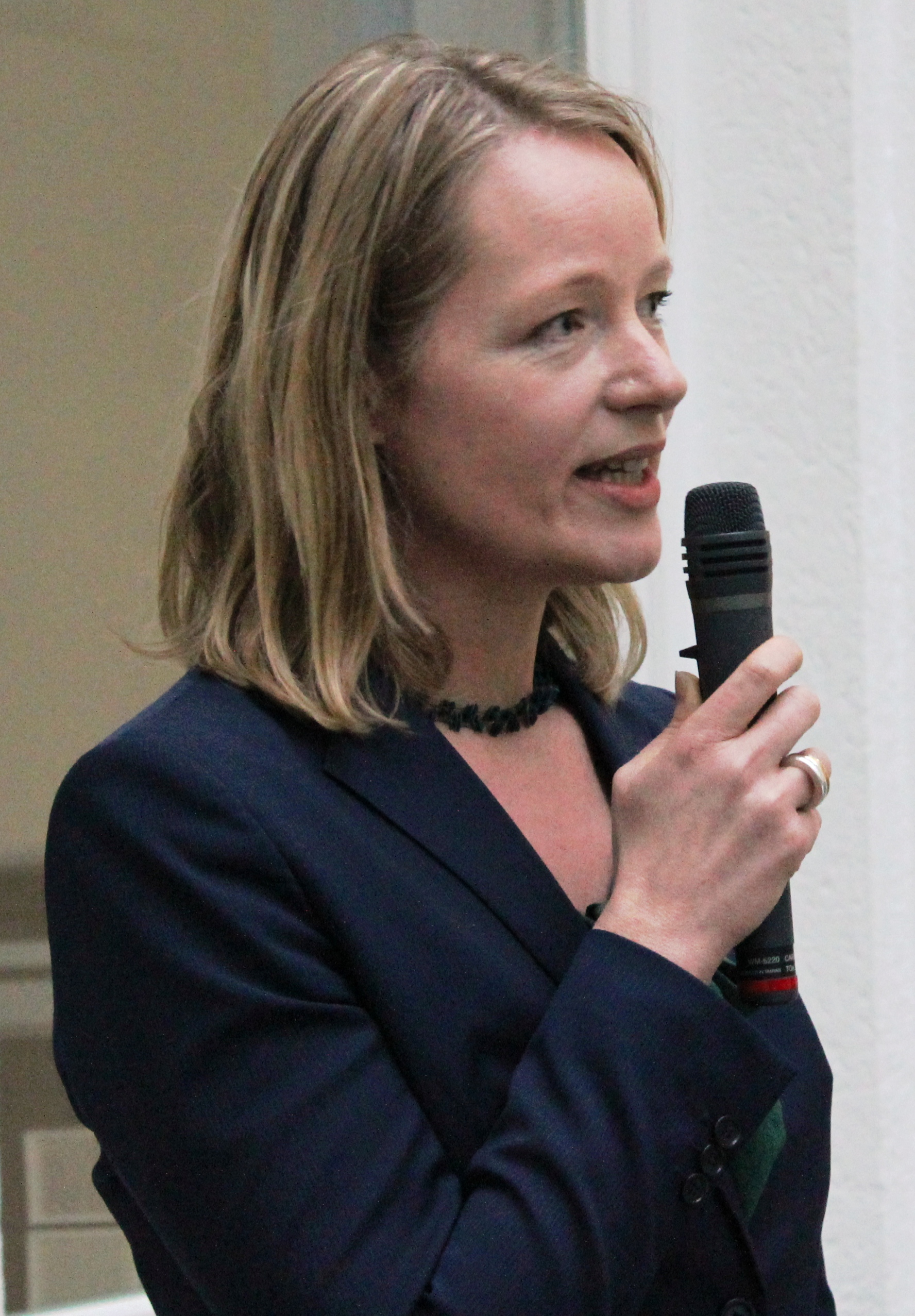 Die Vorsitzende der Grünen Baden-Württemberg, Thekla Walker, bei der Eröffnung der (neuen) Landesgeschäftsstelle